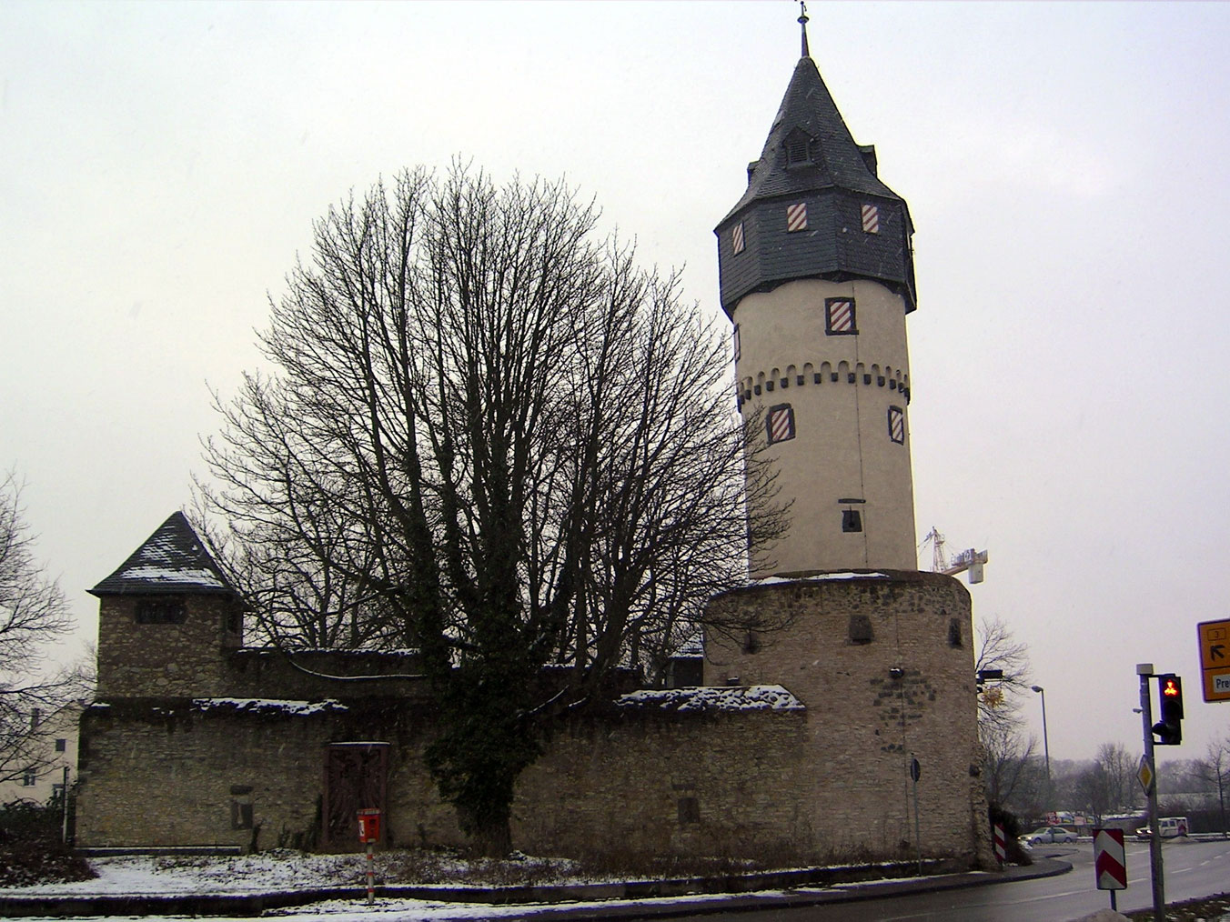 Friedberger Warte - Frankfurt. Die Friedberger Warte, Blickrichtung Nordwesten